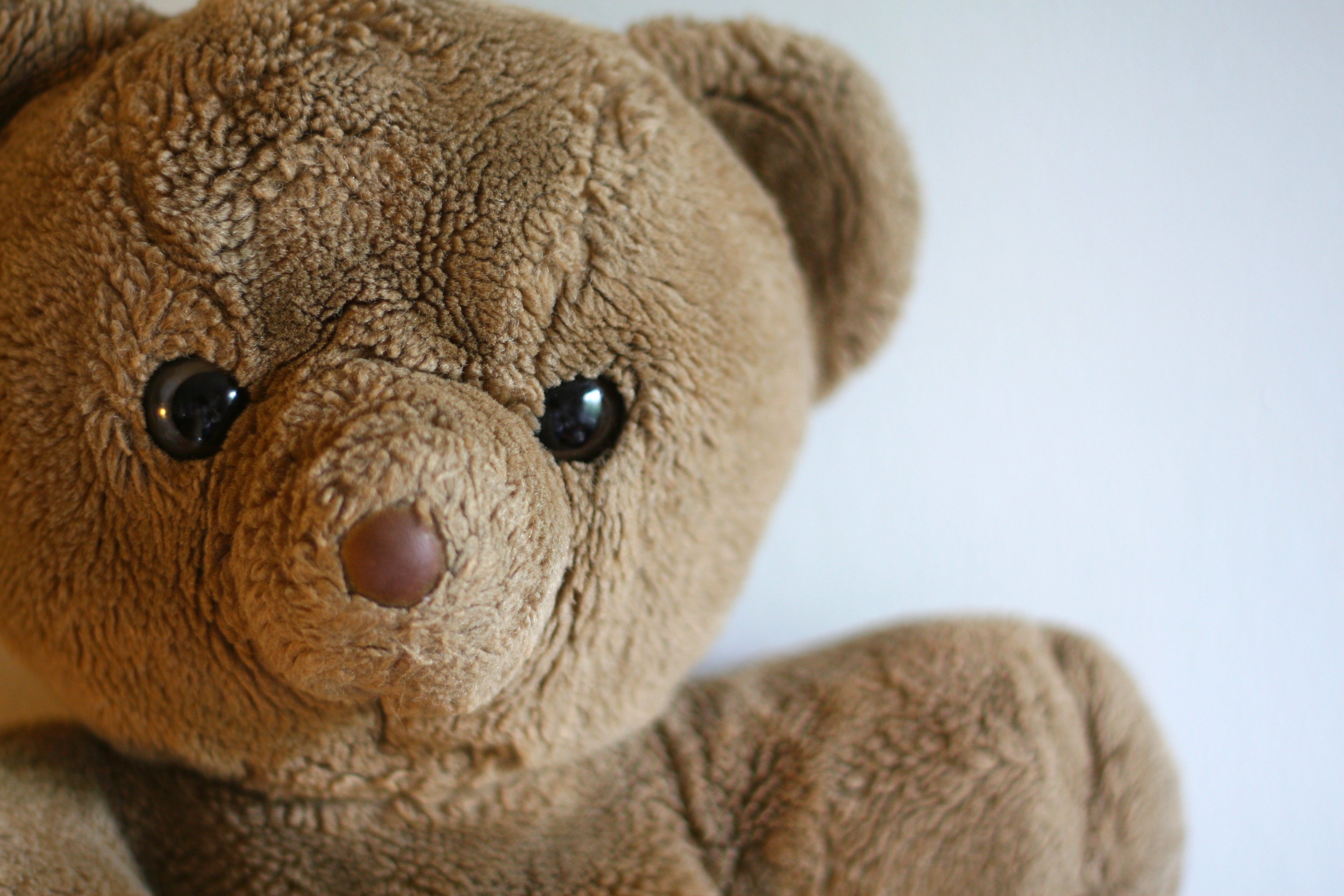 A teddybear.